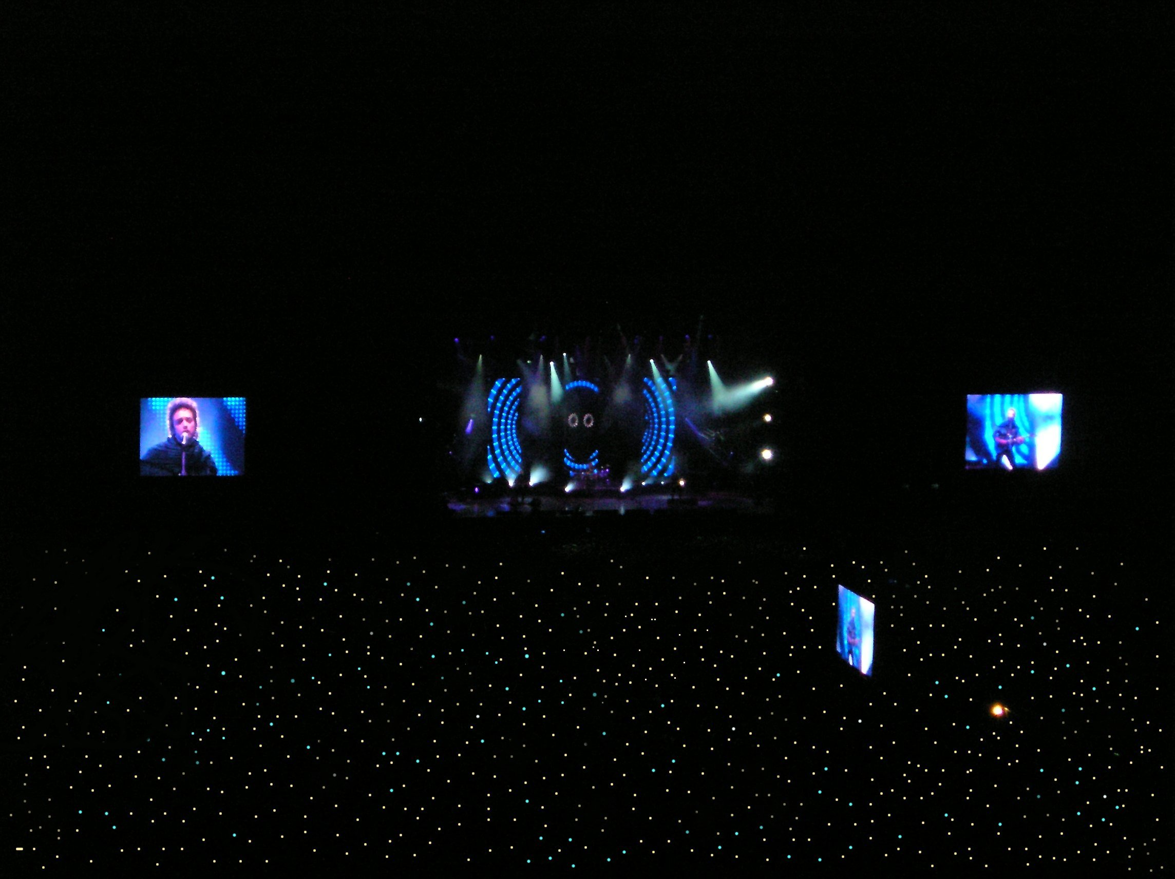 Soda Stereo en Buenos Aires. 2 de noviembre de 2007